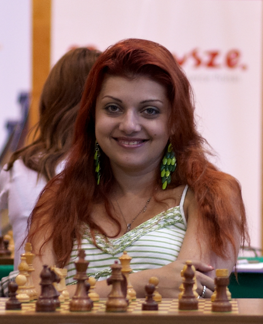 WGM Evgeniya Doluhanova, Memoriał Mieczysława Najdorfa, Warszawa 2012.